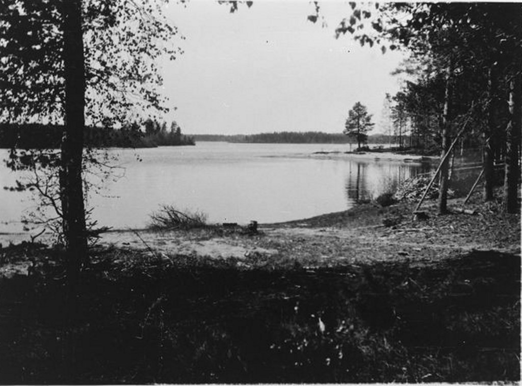 Uuksujärvi, 1920-30-е гг.